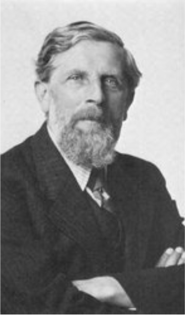 Ernst Ueli, ca. 1920